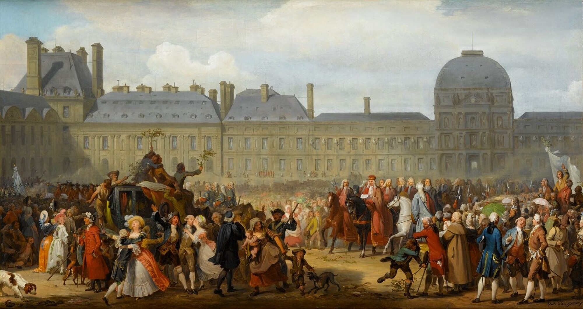 Publication du traité de paix de Versailles entre la France et l'Angleterre, 25 novembre 1783. Fin de la Guerre d'Indépendance américaine. Dimensions : 79,9 x 144,3 cm. Matière et technique : huile sur toile.